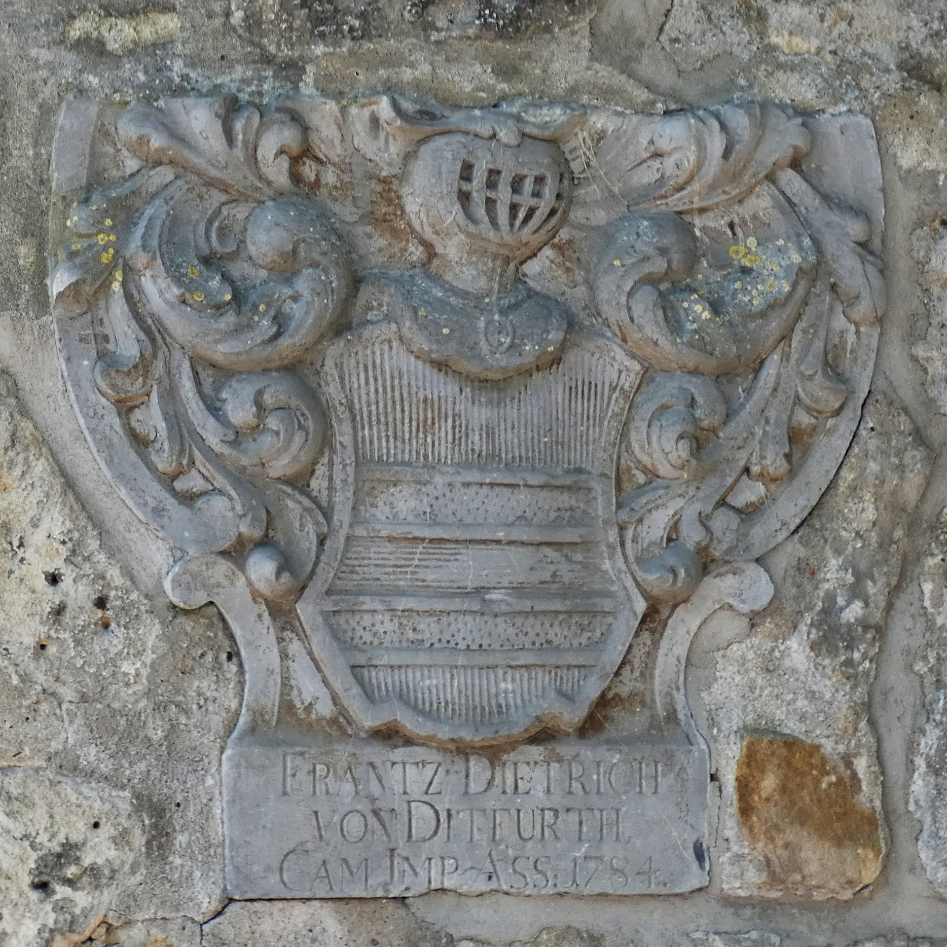 Wappen am Haupttor von Gut Lemmie